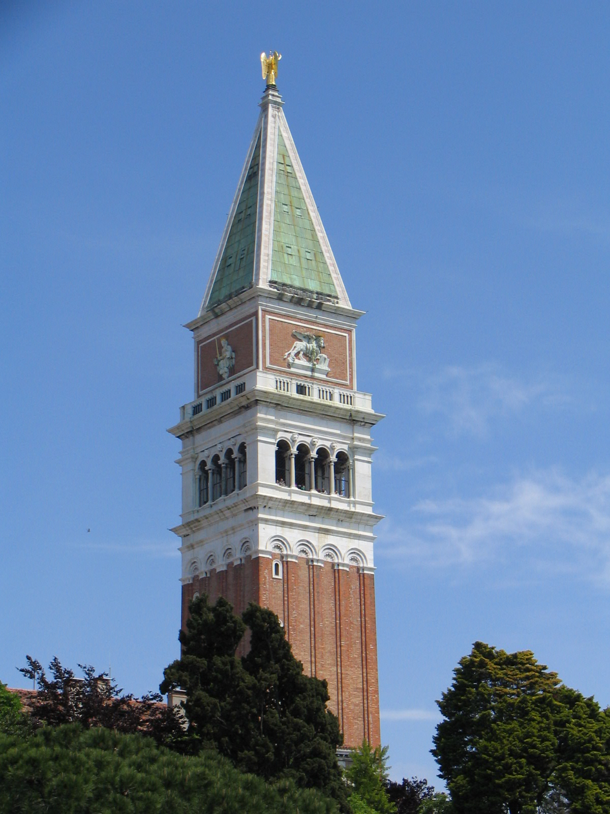 Campanile de Venise, vu du Grand Canal